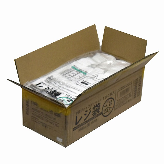 レジ袋(手提げ袋）参考写真